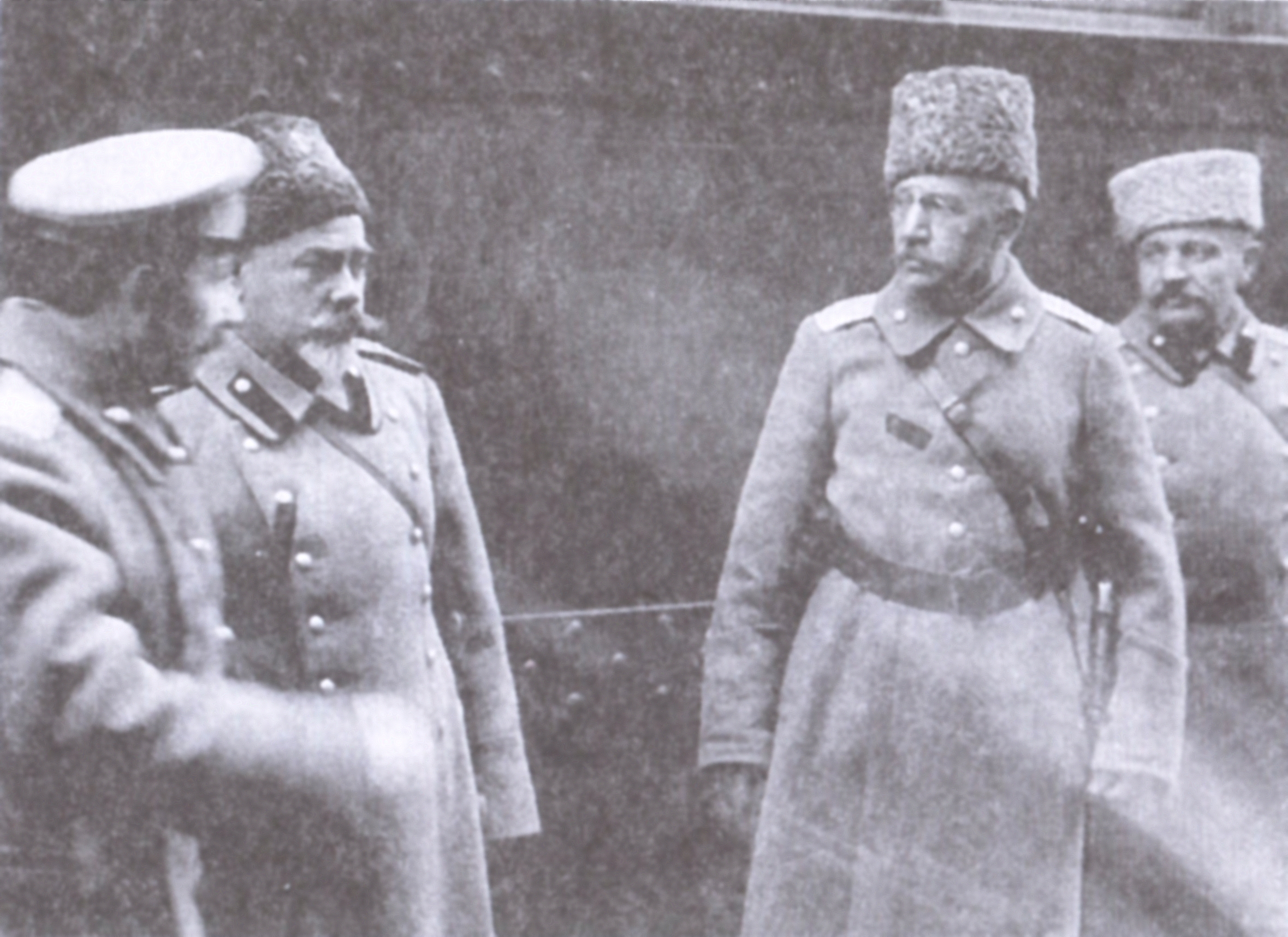 Командный состав Добровольческой армии: генералы А.П. Богаевский, А.И. Деникин, П.Н. Краснов. Станция Чир. 1918 г.